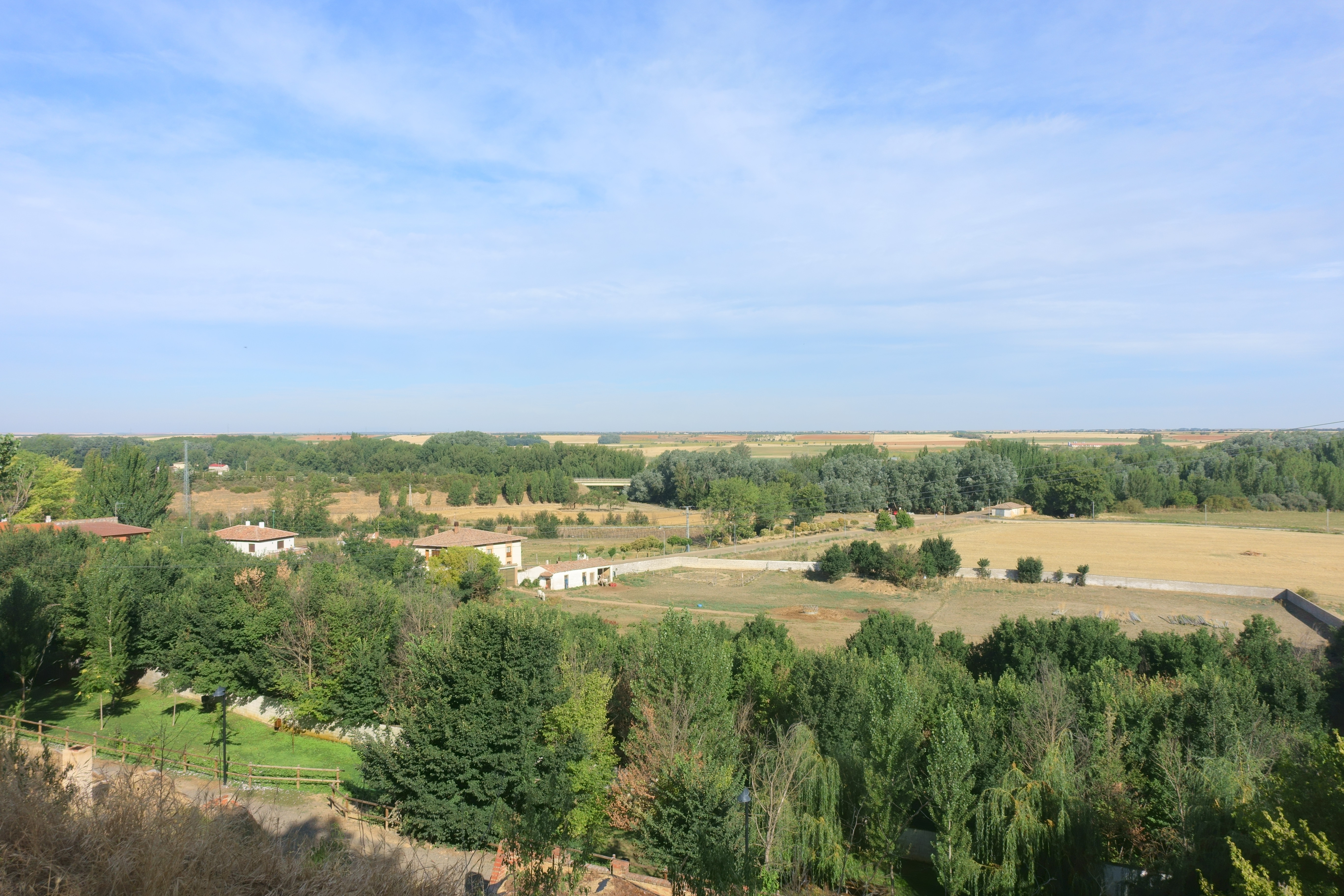 Vista de la vega del río Cea desde Mayorga (Valladolid, España).